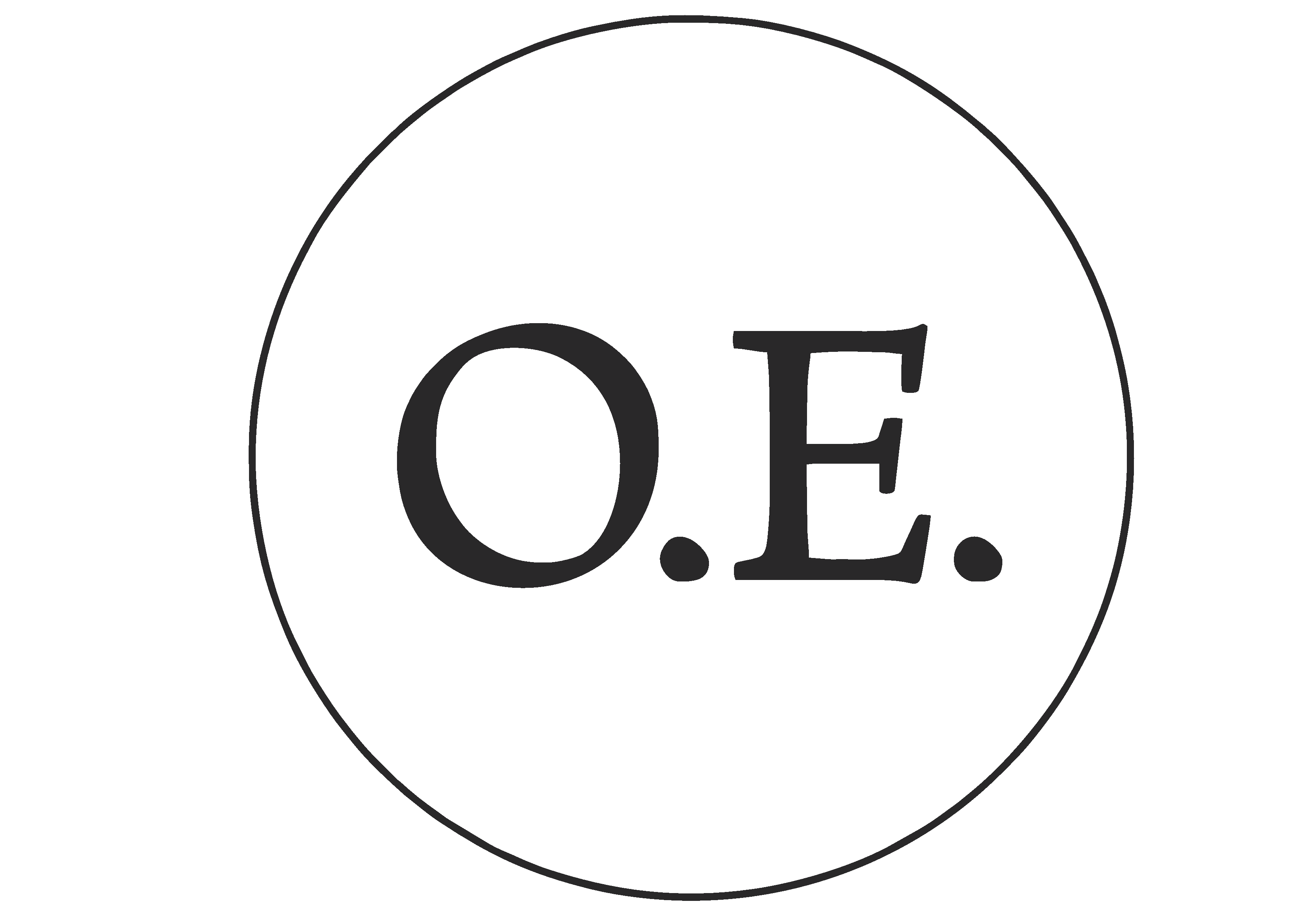 Логотип «Океан Ельзи».